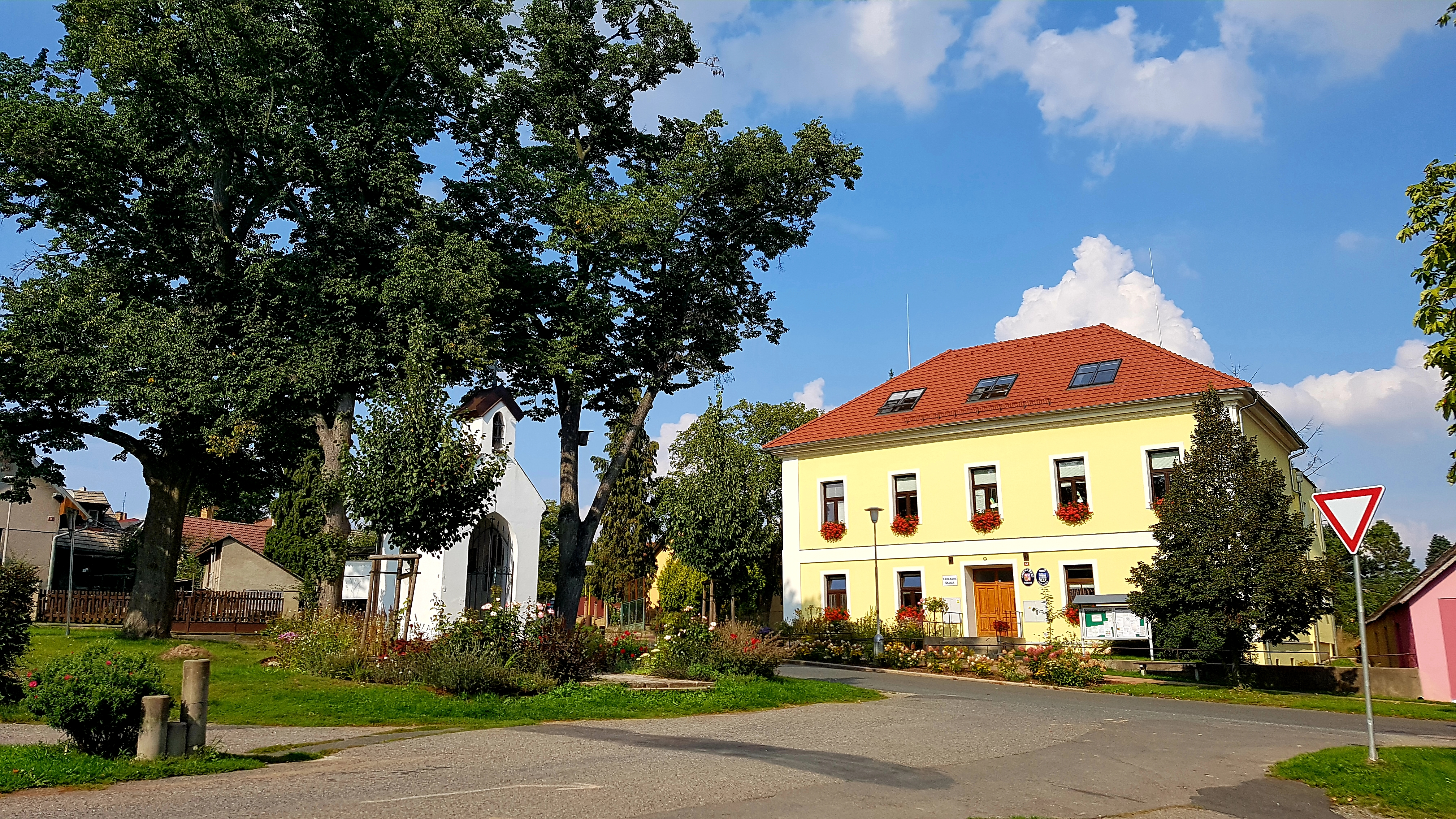 Pohled na kapličku a ZŠ Vyžlovka